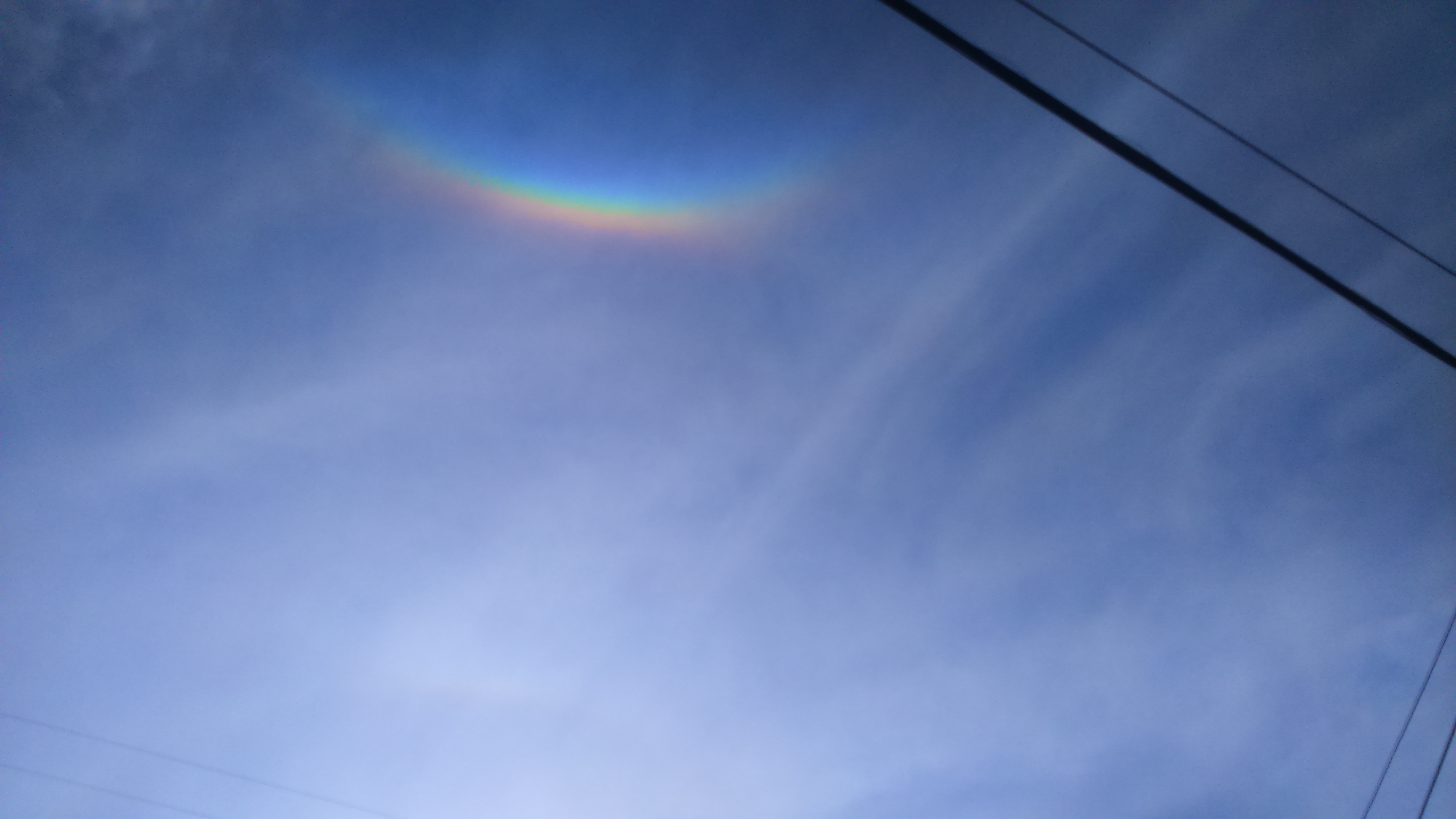 Arco circuncenital el 15 de Julio de 2016